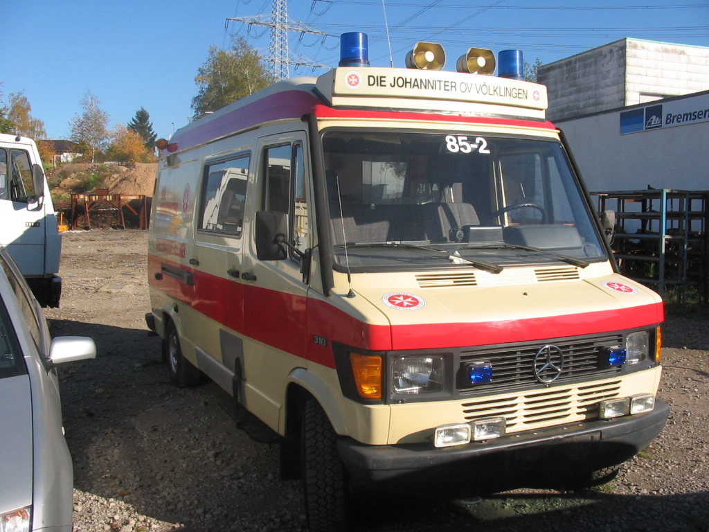 MB Rettungswagen der Johanniter Unfallhilfe